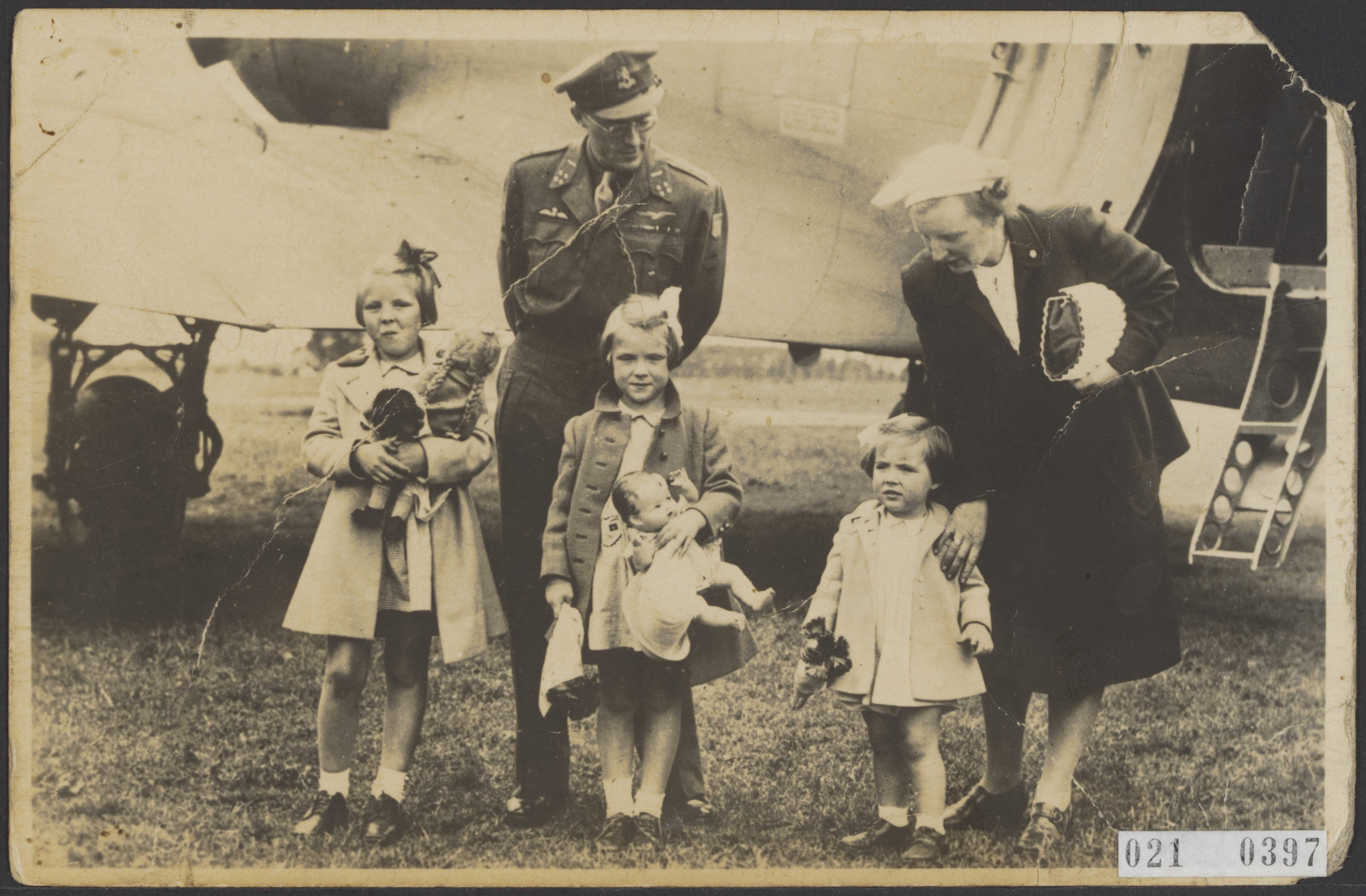 Collectie / Archief : Fotocollectie Elsevier Reportage / Serie : [ onbekend ] Beschrijving : Aankomst prinses Juliana en haar drie dochters in Nederland op vliegveld Teuge . v.l.n.r. prinses Beatrix, prinses Irene en prinses Margriet Datum : 2 augustus 1945 Locatie : Gelderland, Teuge Trefwoorden : koninklijk huis, prinsen, prinsessen, tweede wereldoorlog, vliegvelden Persoonsnaam : Beatrix, prinses, Bernhard, prins, Irene, prinses, Juliana, prinses, Margriet, prinses Fotograaf : Fotograaf Onbekend / Anefo Auteursrechthebbende : Nationaal Archief Materiaalsoort : Foto (zwart/wit) Nummer archiefinventaris : bekijk toegang 2.24.05.02 Bestanddeelnummer : 021-0397